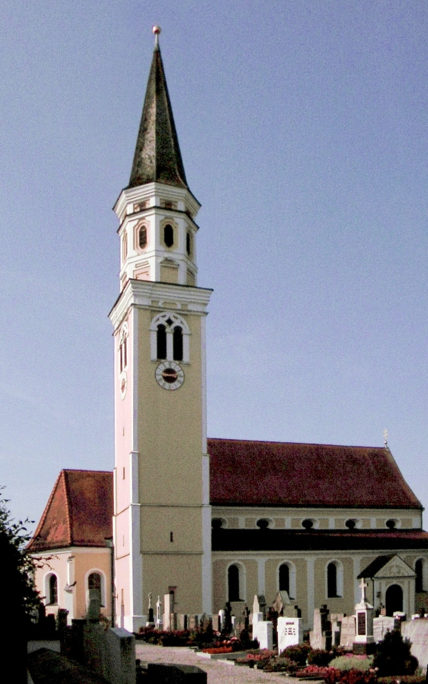 Pfarrkirche St. Benedikt in Odelzhausen (vom Rathaus aus gesehen).